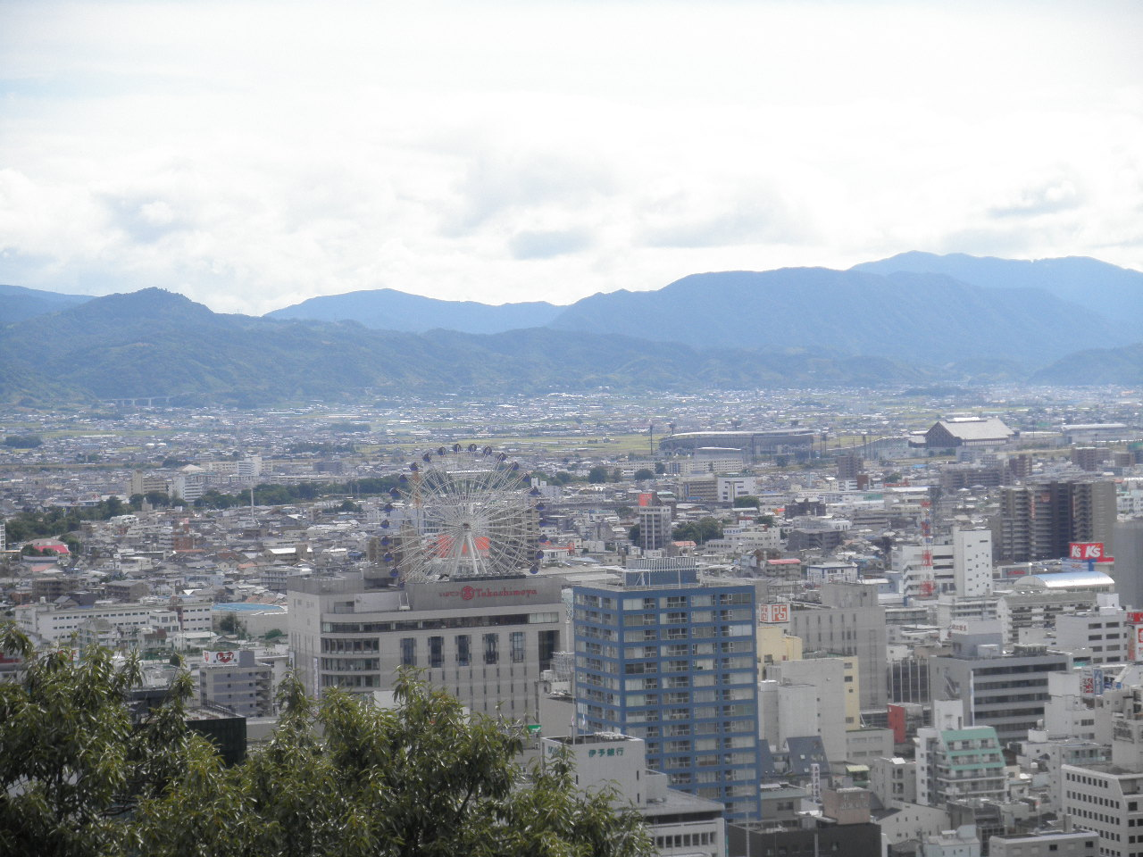 松山城から眺める風景（2010年9月6日）